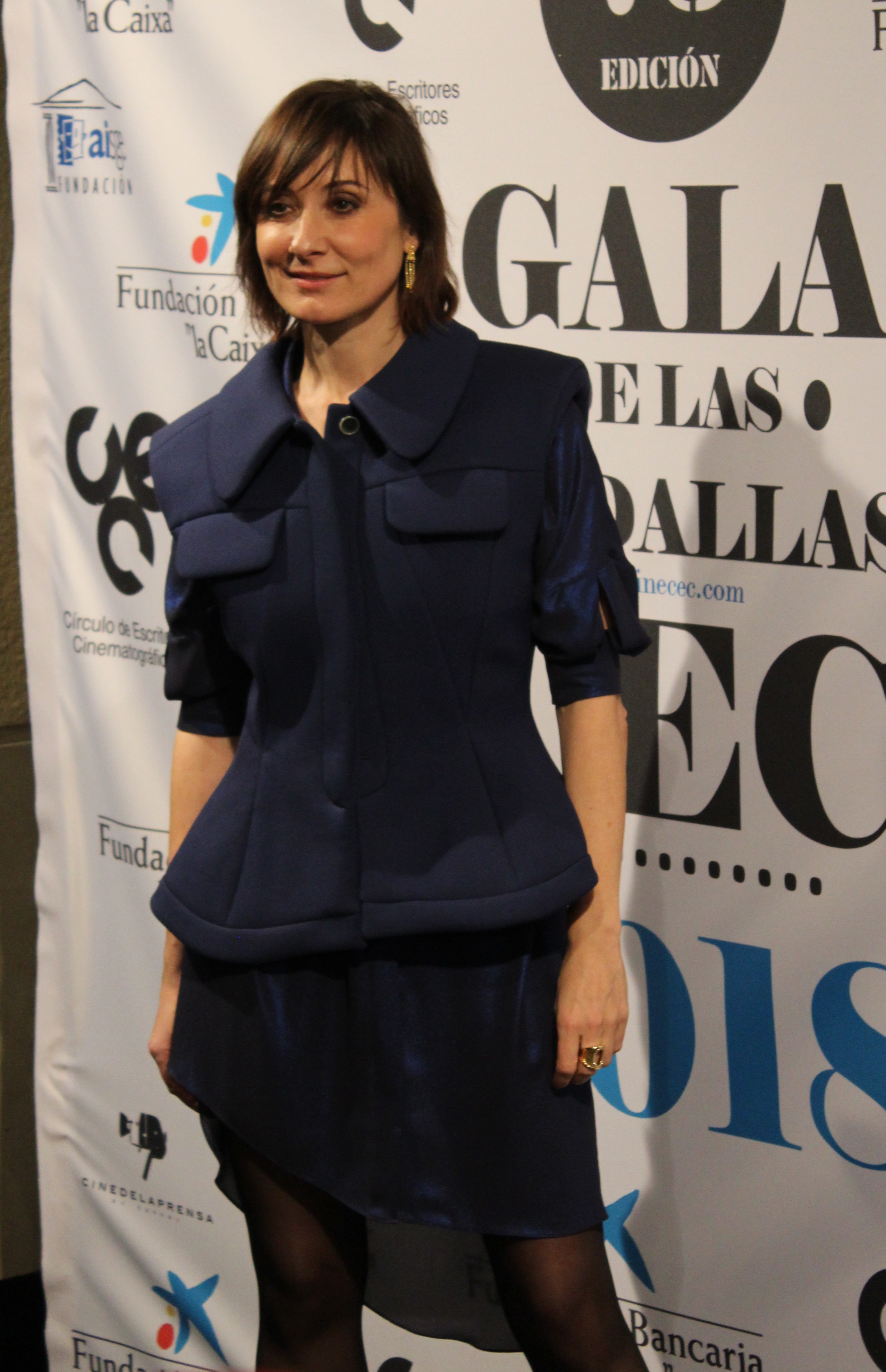 La actriz española Nathalie Poza en la 73 edición de las Medallas del Círculo de Escritores Cinematográficos.